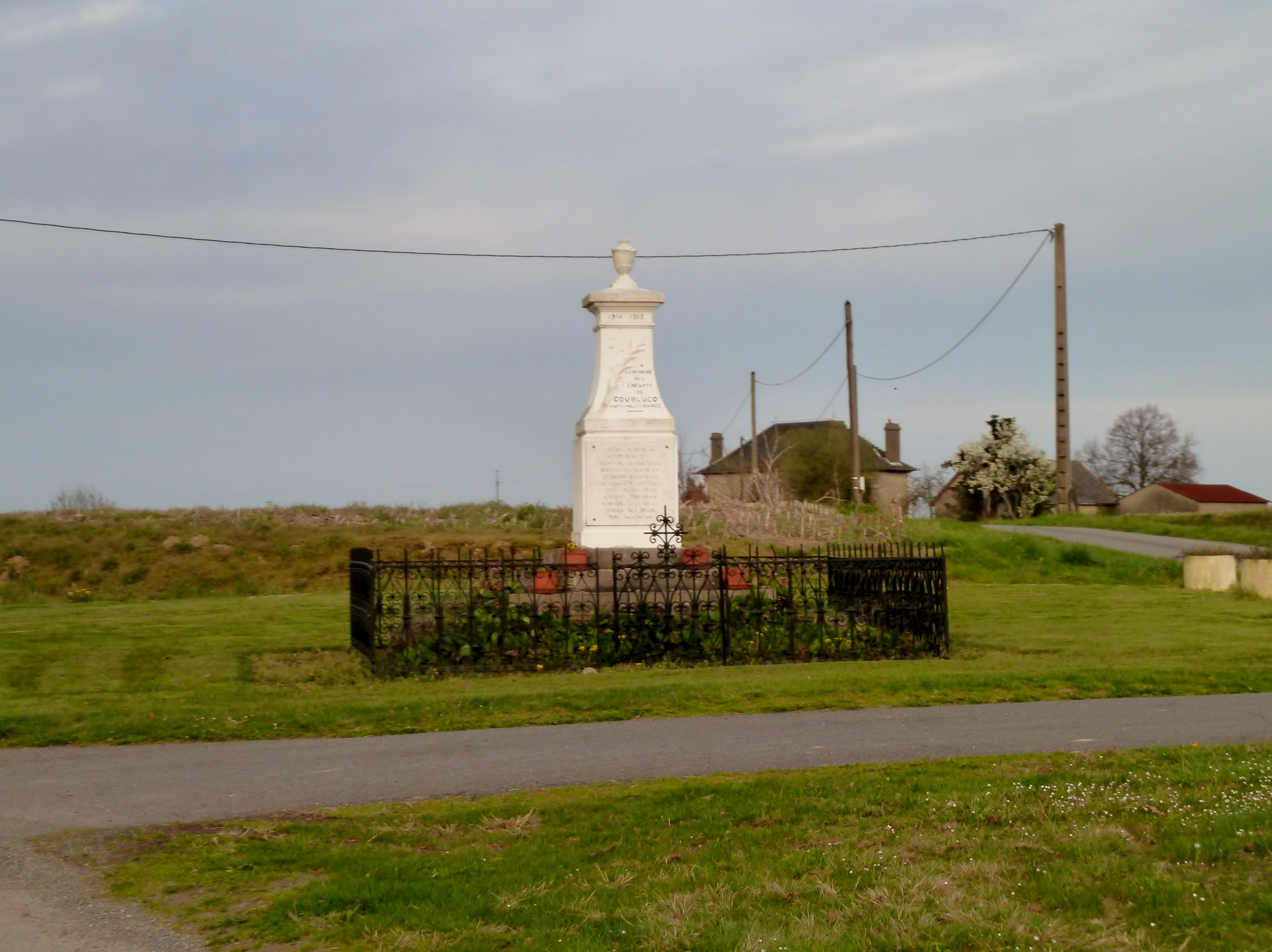 Monument aux morts de Coublucq